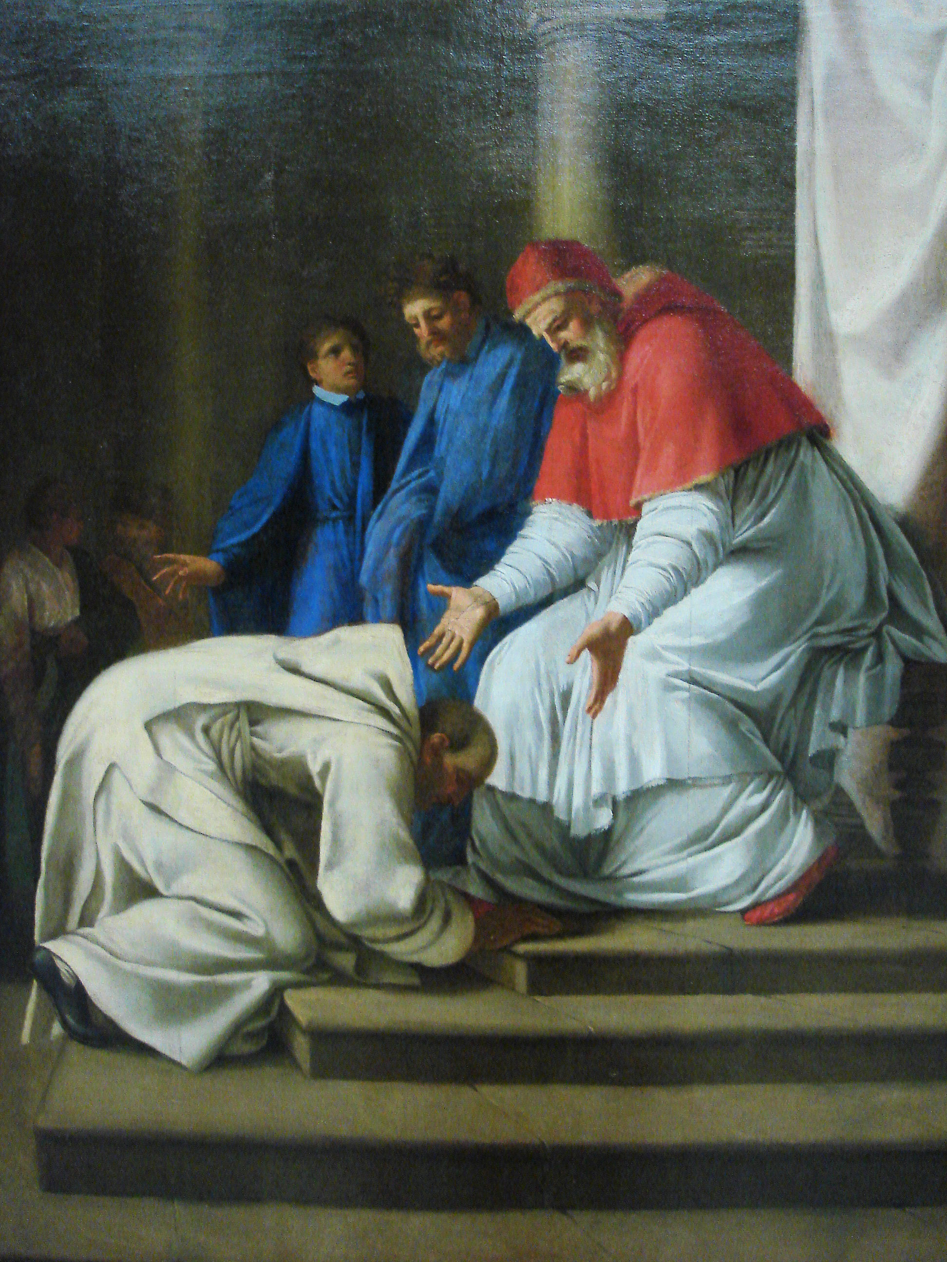 Saint Bruno aux pieds du pape Urbain IIbetween 1645 and 1648 date QS:P,+1645-00-00T00:00:00Z/8,P1319,+1645-00-00T00:00:00Z/9,P1326,+1648-00-00T00:00:00Z/9Saint Bruno se prosterne devant le pape Urbain II qui l'invite à se relever.